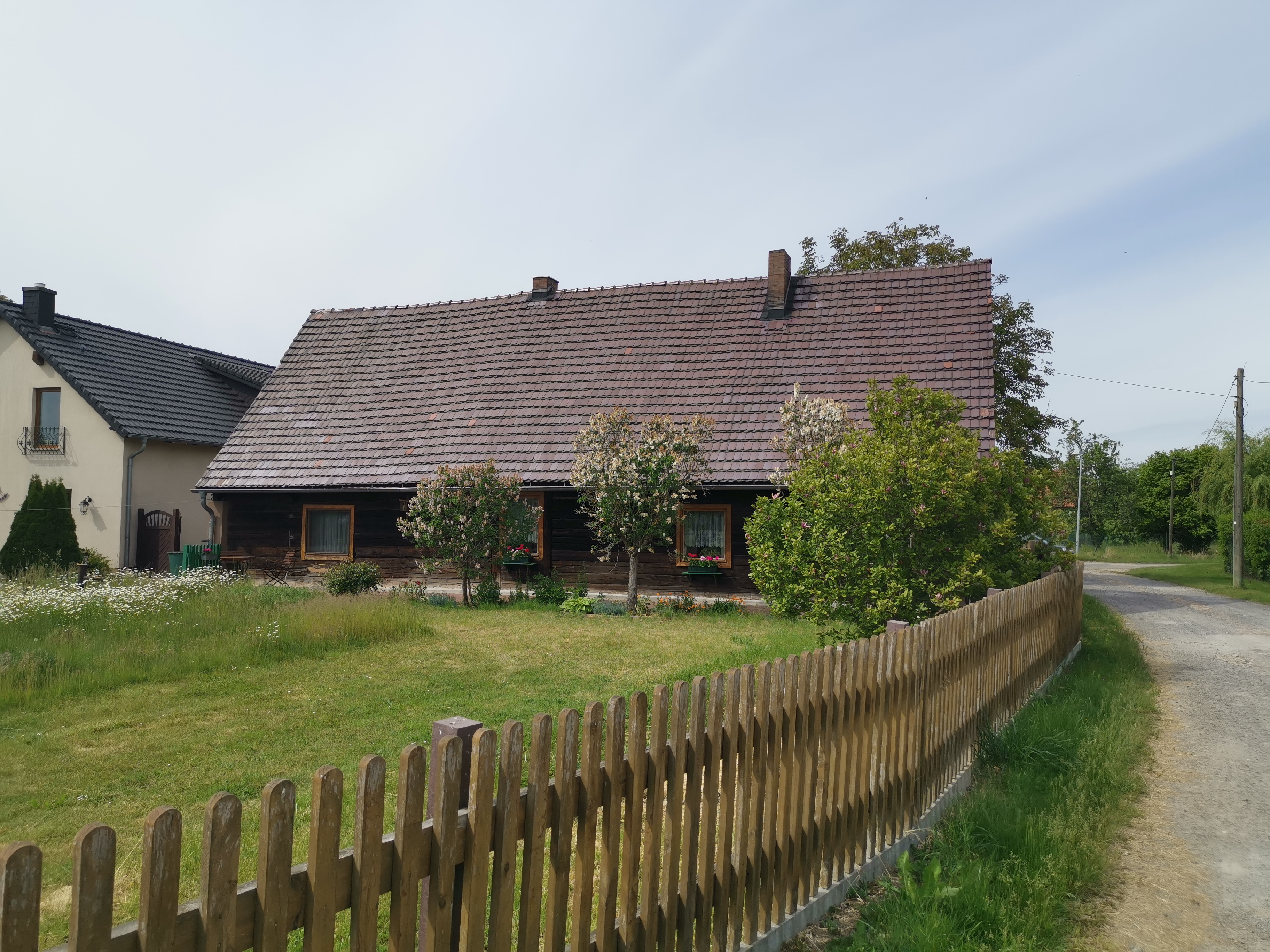 Ringstraße 54 in Groß Döbbern